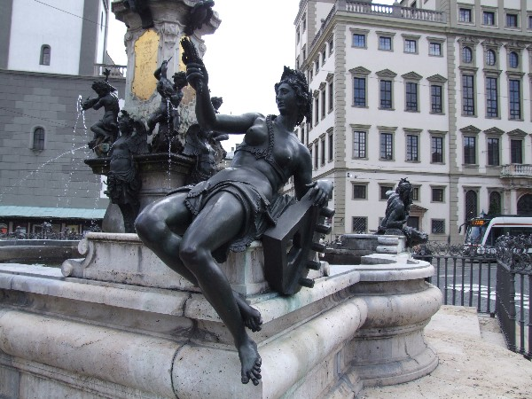 Augustusbrunnen, Augsburg Rathausplatz, Darstellung der Singold